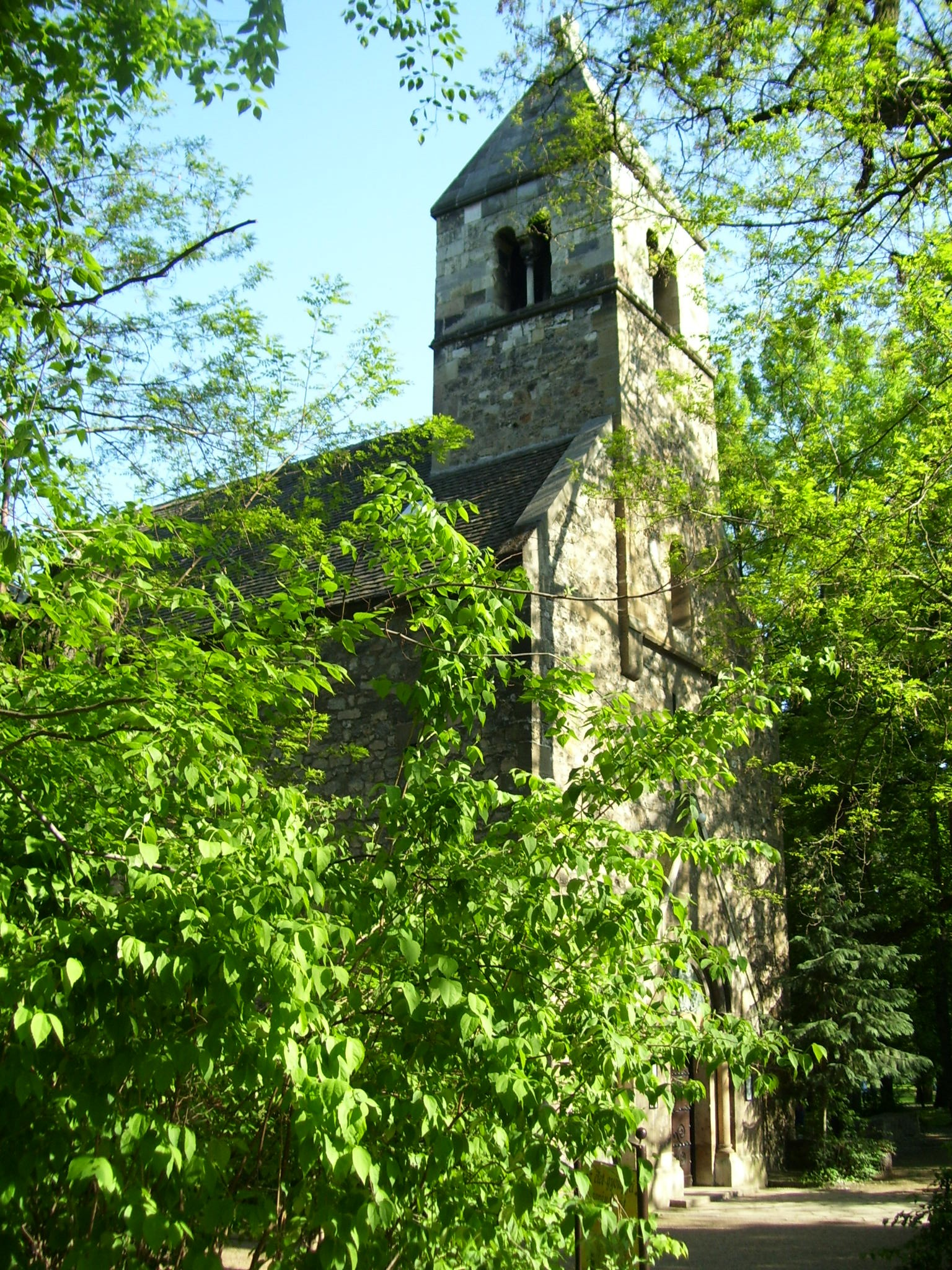 Premontrei templom a XII. századból. Budapest-Margitsziget